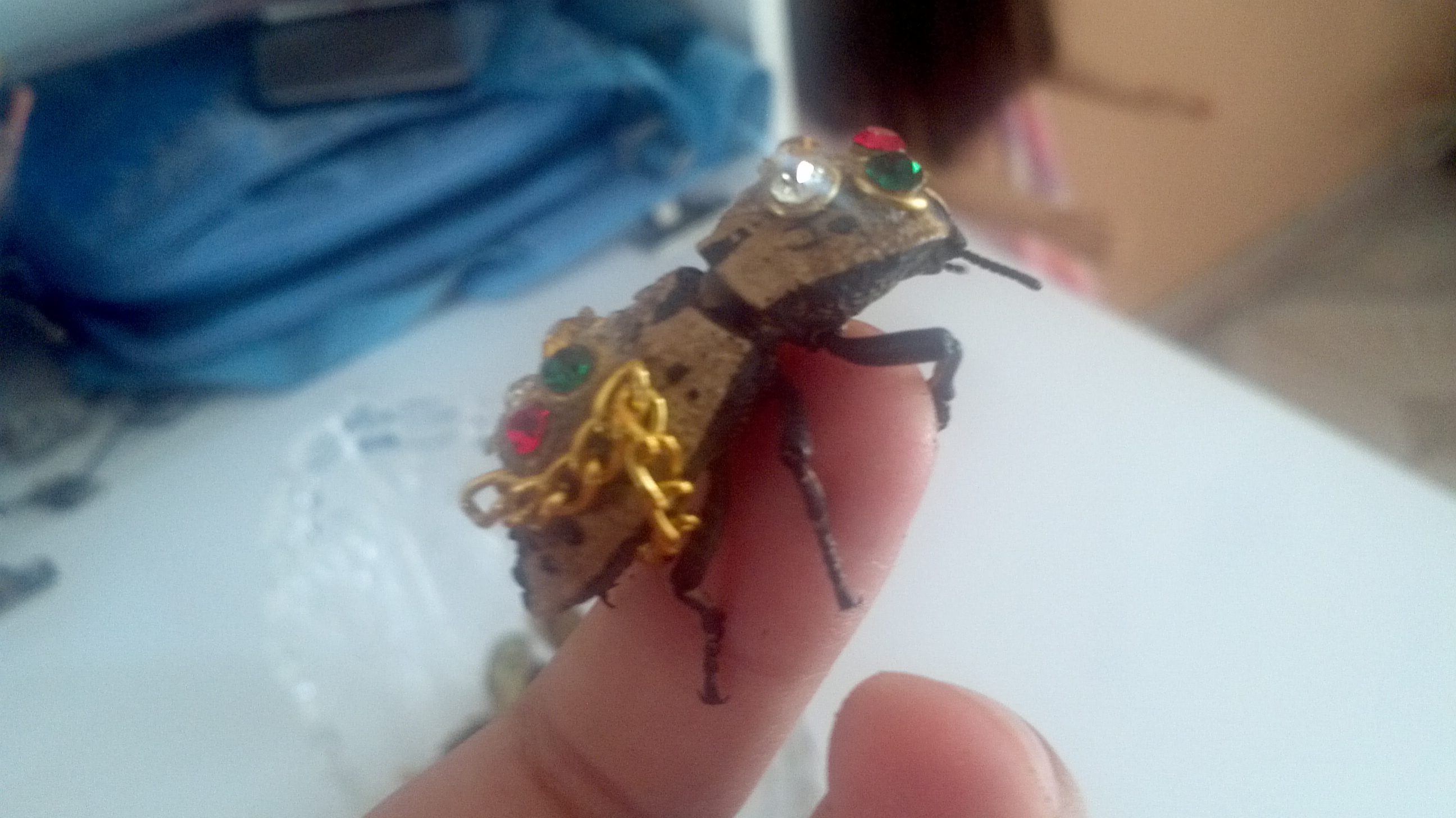 Insecto yucateco decorado para su uso como joya o amuleto de amor.